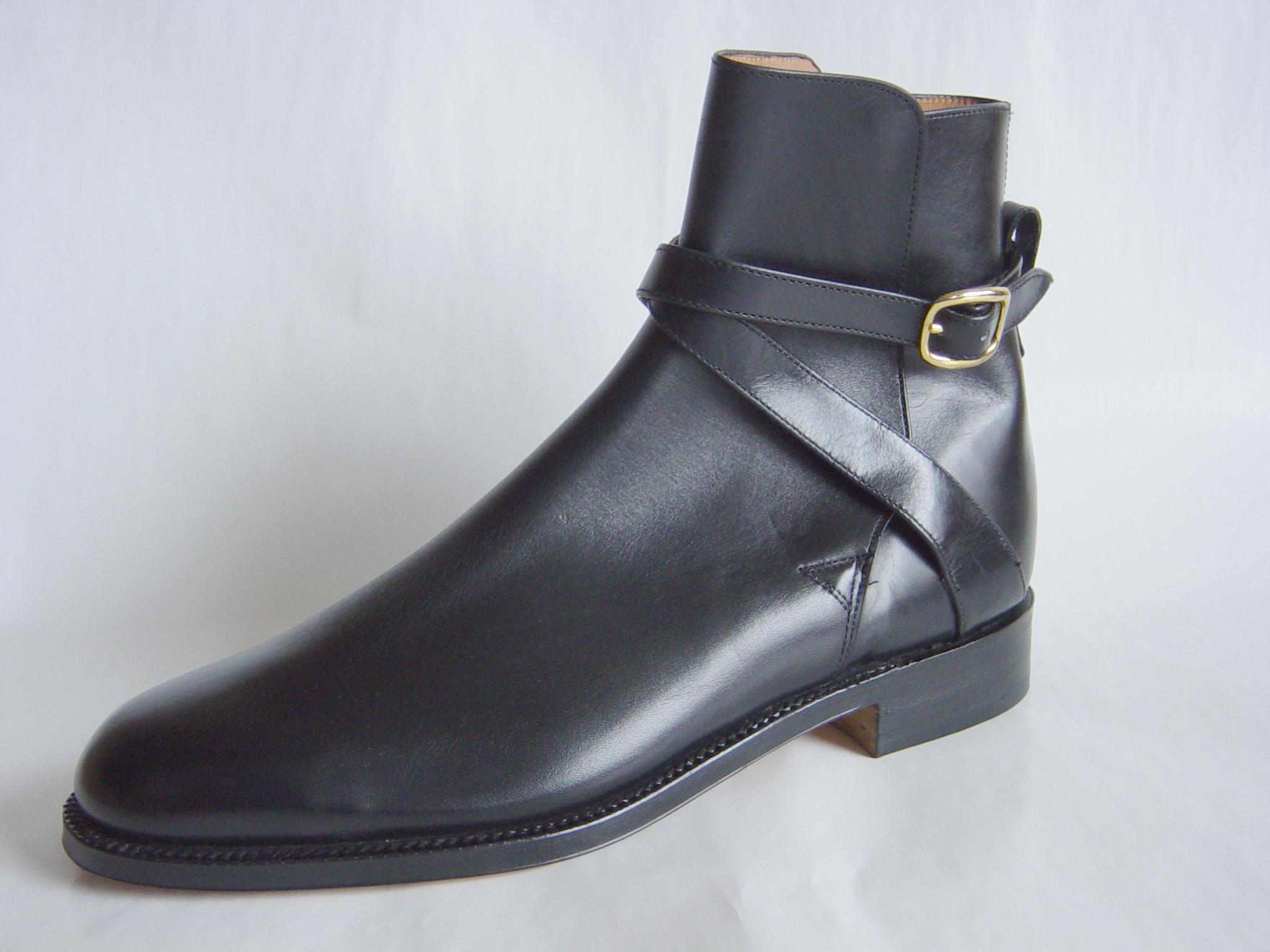 Sujet:Jodhpur-Stiwwel vu Grenson Source:Fotograf:Rainer Ersfeld, Konstanz Lizenz:CC 2.0